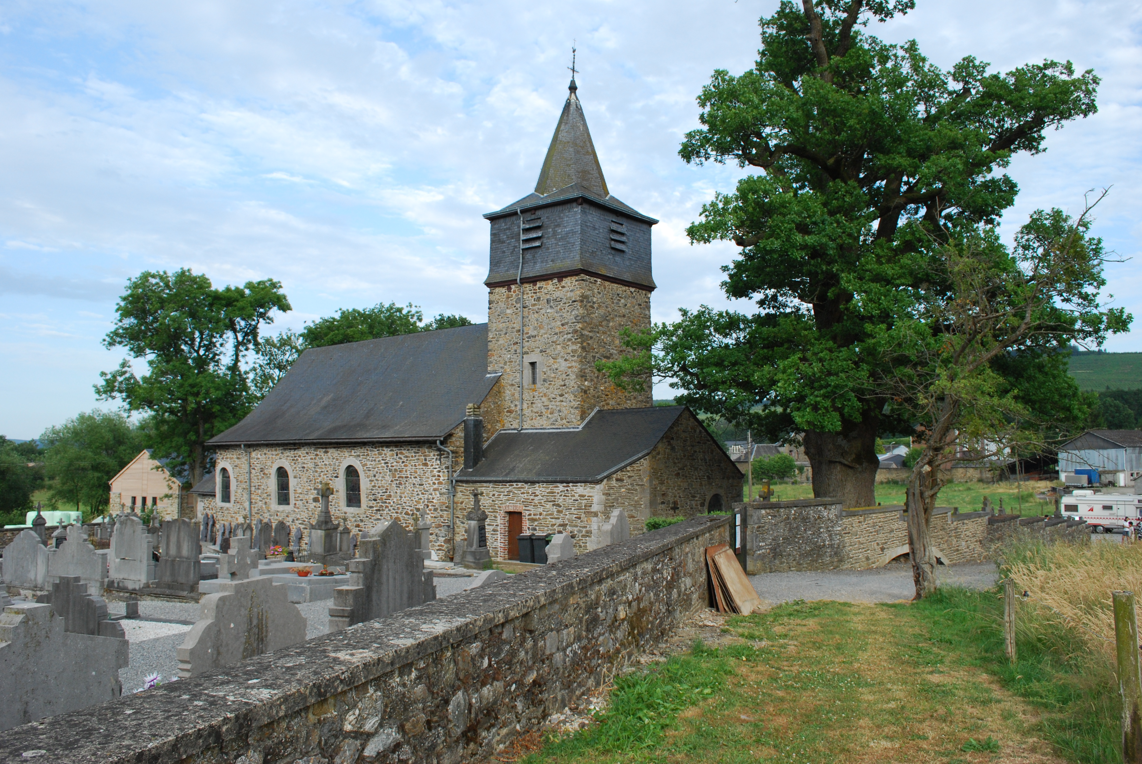 L'église Saint-Paul à Rahier (Stoumont).